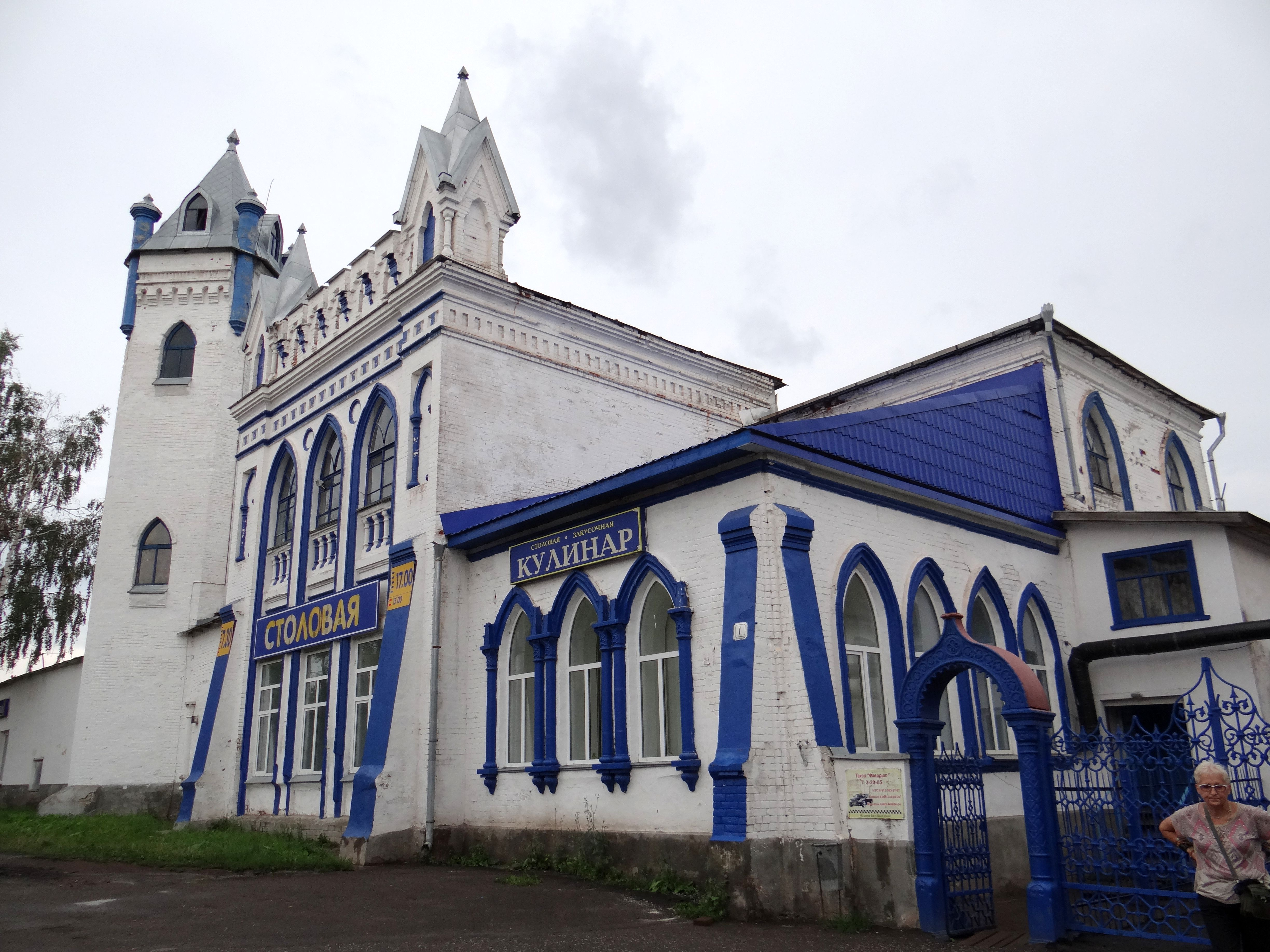 Особняк вахрушева (Кировская область, Слободской, р. п. вахруши)